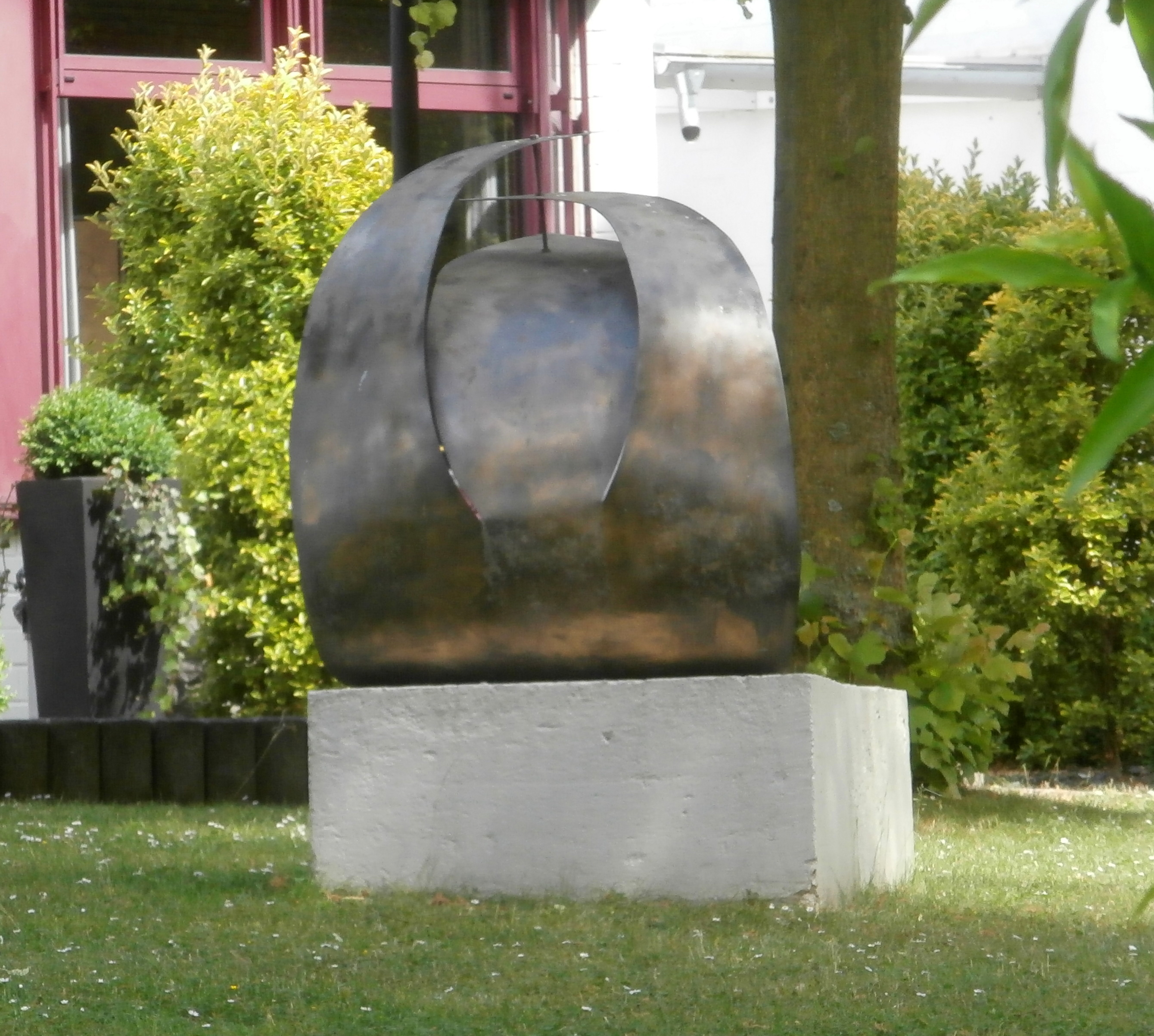 Ansicht von der Rheinuferpromenade